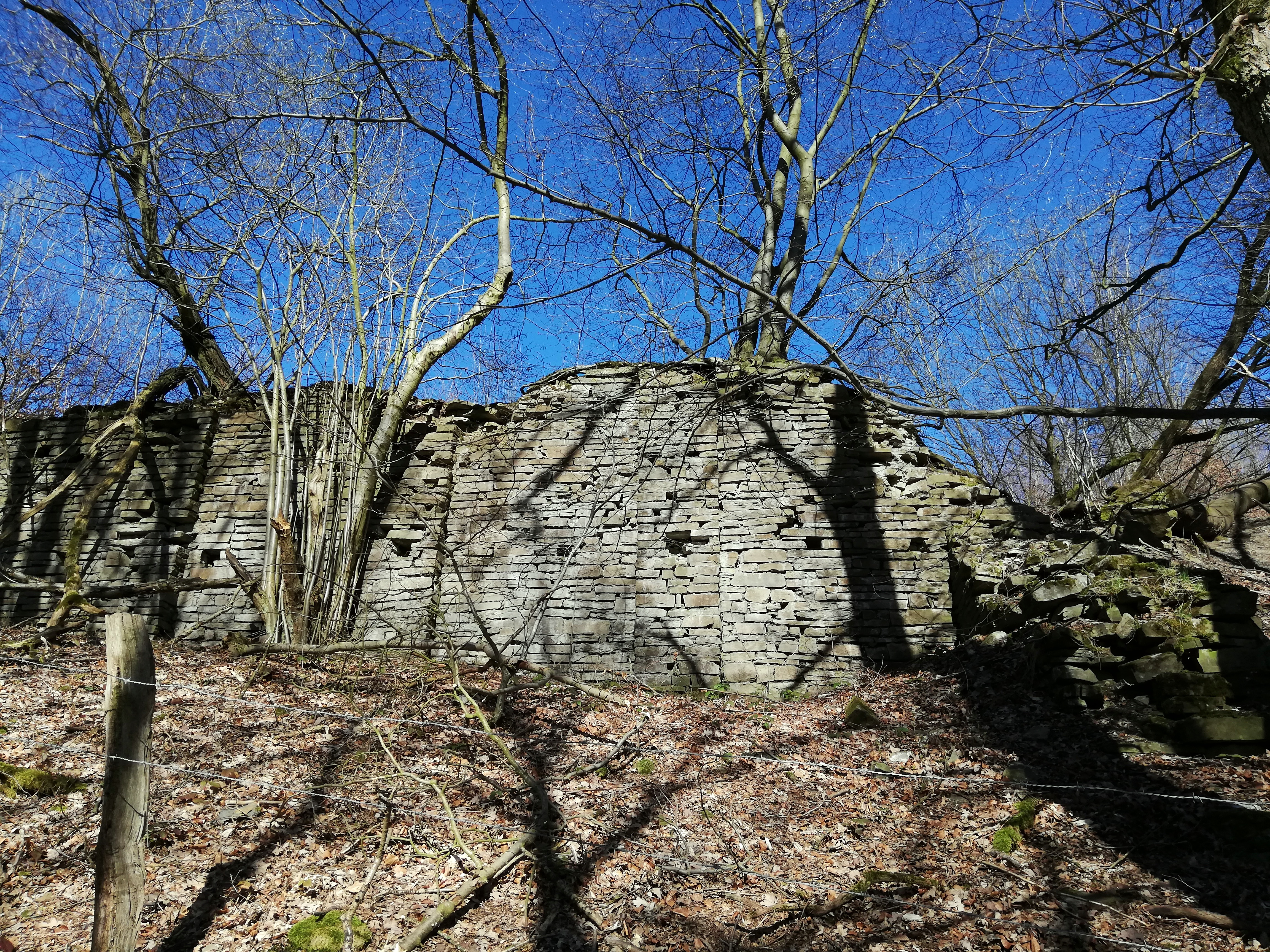 Weitere Infos werden noch gesucht.